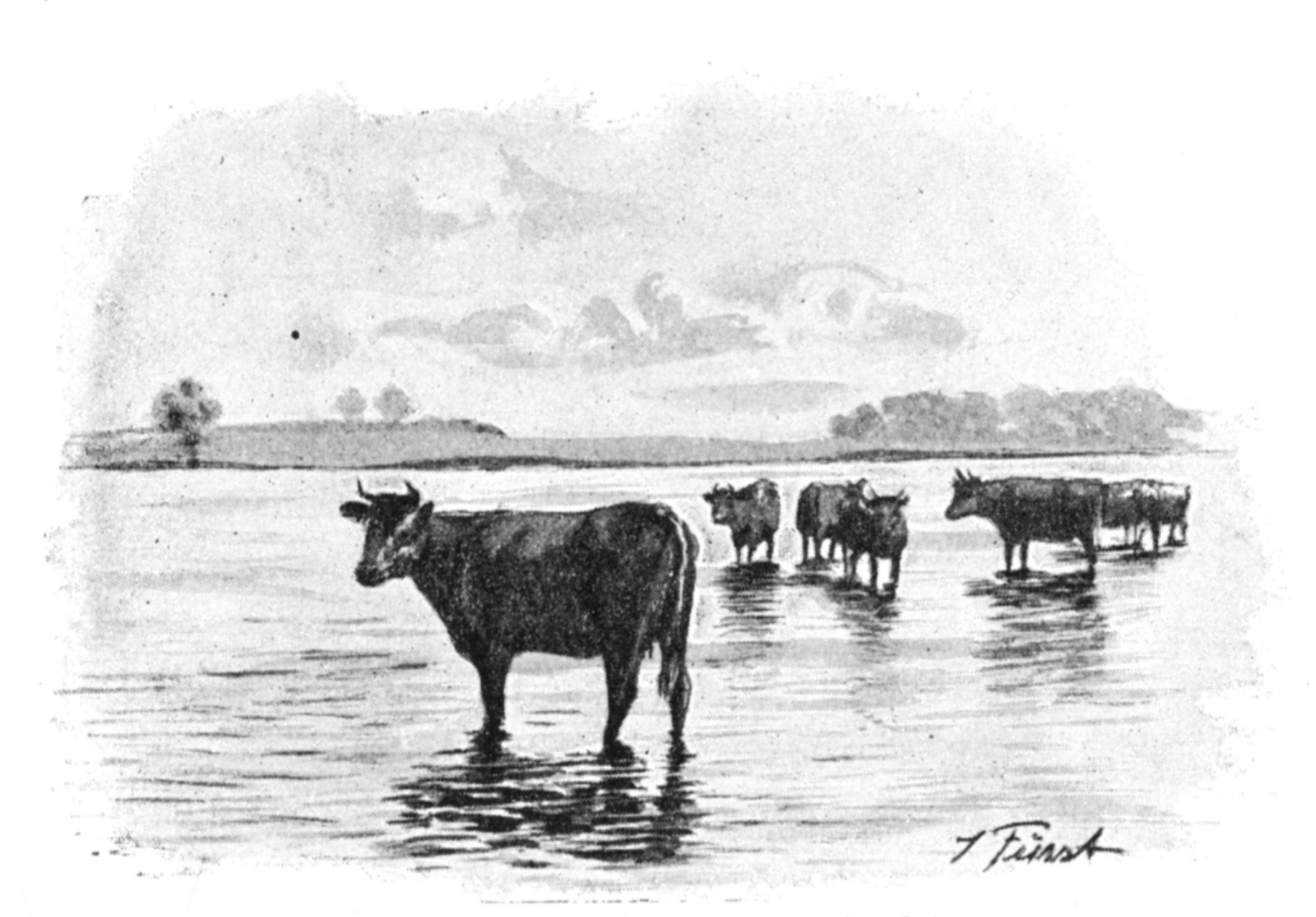 Angeler Kühe an der Schlei, Zeichnung von Julius Fürst um 1895